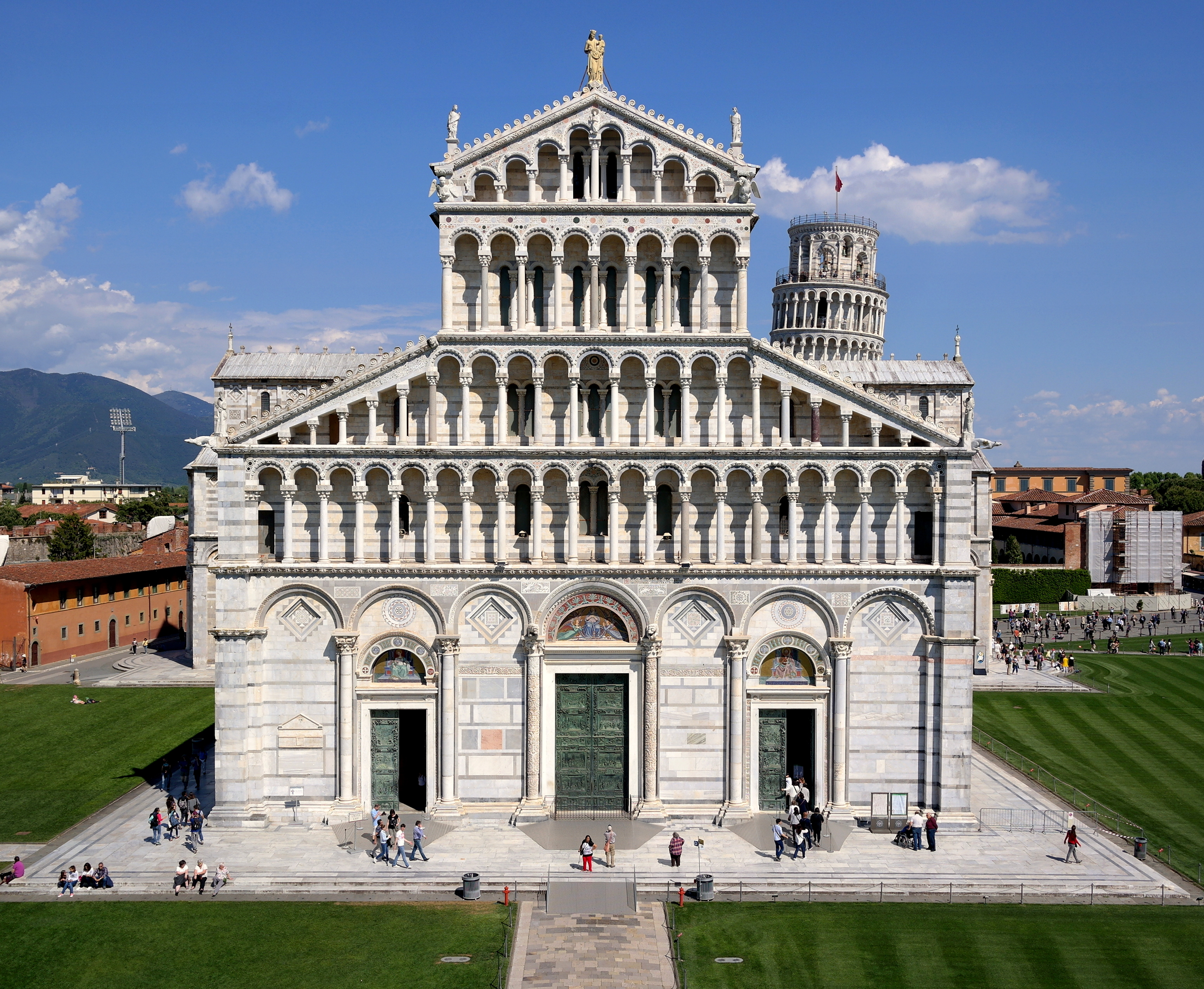 Cattedrale di Santa Maria Assunta (Pisa), vista dal Battistero